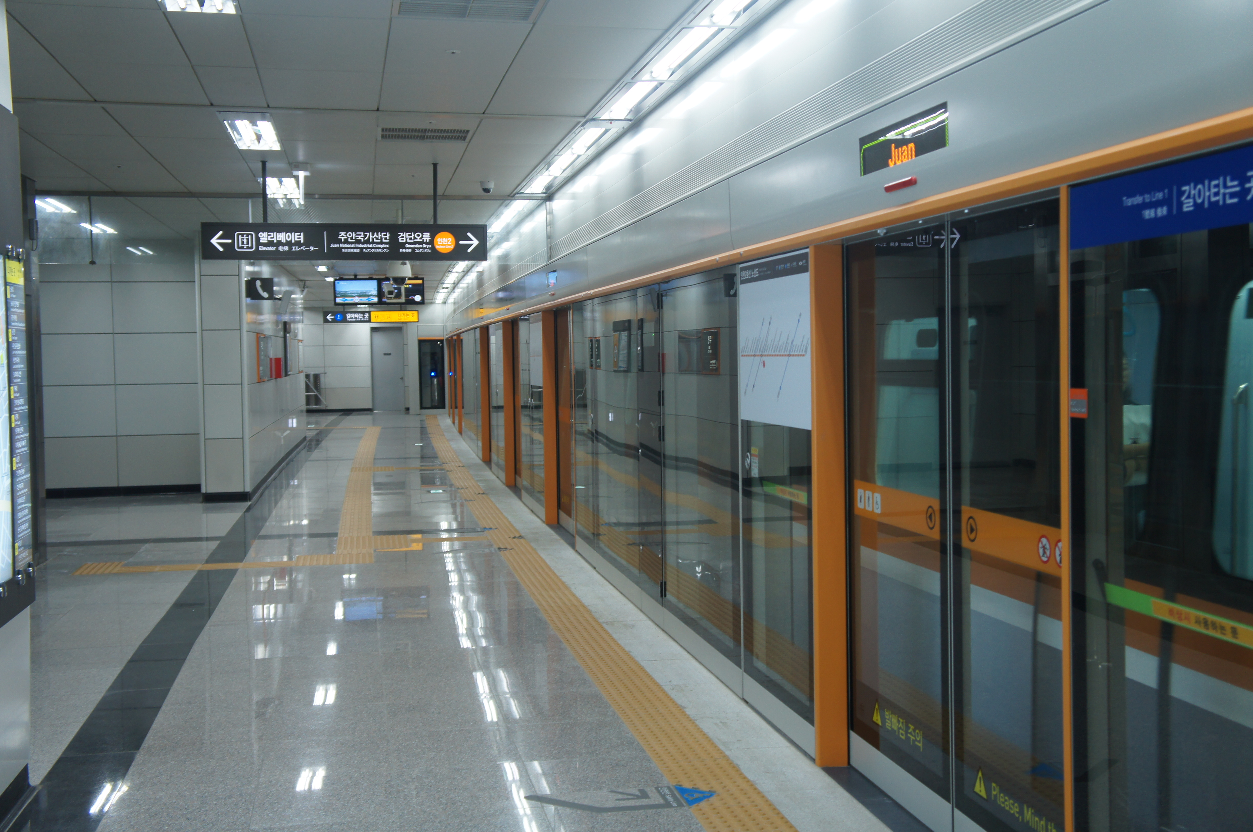 인천2호선 주안역 승강장